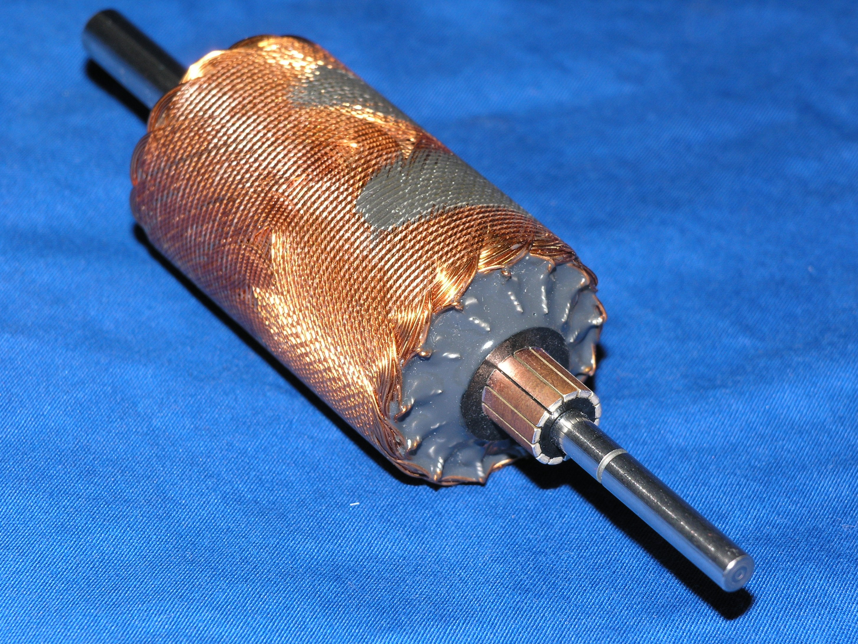 eisenlos gewickelter Rotor einer elektrischen Maschine. Die Kupferwicklungen werden durch eine Schicht Klarlack isoliert und durch eine zweite Schicht zusammengeklebt. Vorne im Bild ist der Kollektor, wo im eingebauten Zustand Bürsten den Strom übertragen. Der graue Lack oben auf dem Rotor stammt vom dynamischen Auswuchten. Aussendurchmesser 28 mm, Welle ritzelseitig 6 mm, kollektorseitig 4 mm